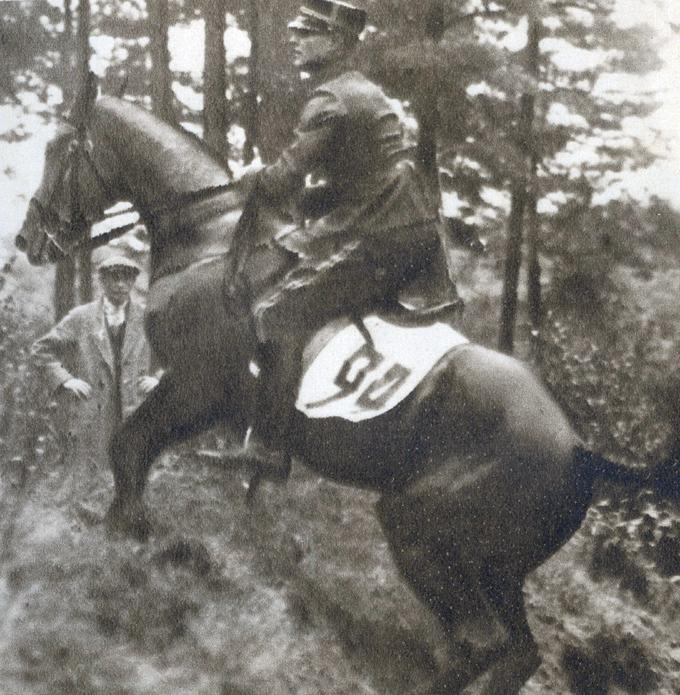 Helmer Mörner